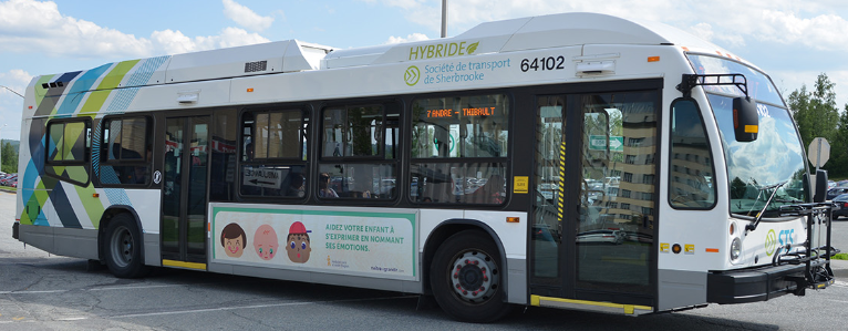 Autobus de la Société de transport de Sherbrooke